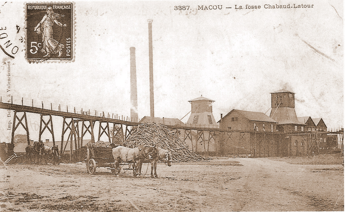 Ancienne fosse Chabaud Latour arrêtée depuis 1910